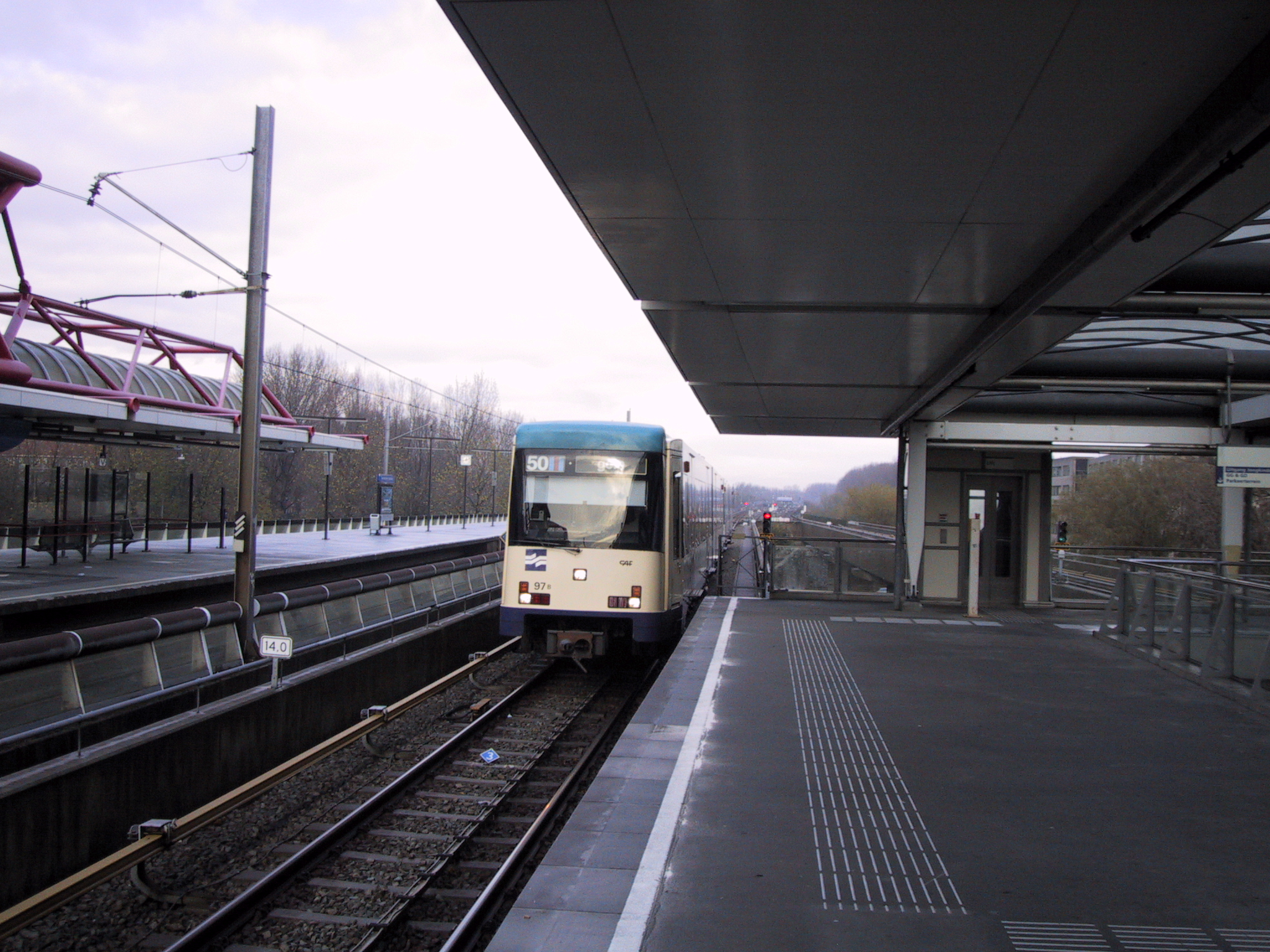 Me - 26/11/2005 - AMS Central station